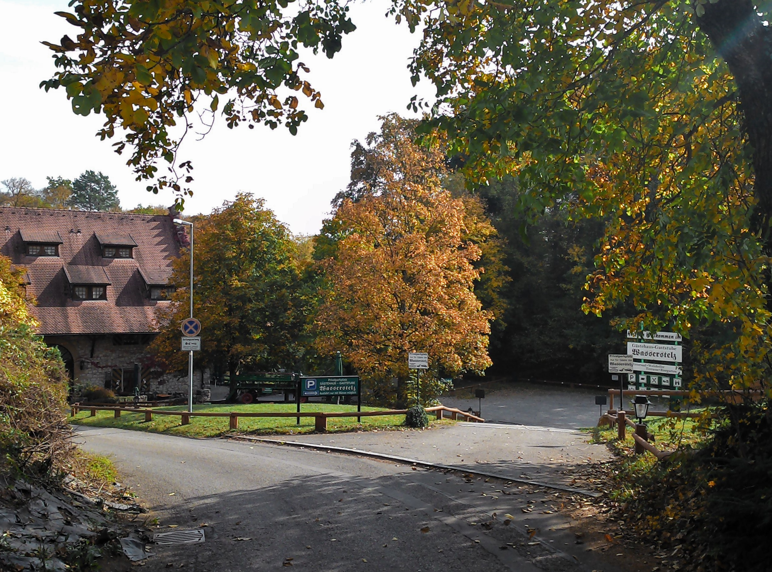 Schlosshof (Hotel Wasserstelz) bei der Guggenmühle und Burg Weisswasserstelz, Hohentengen am Hochrhein, Landkreis Waldshut.